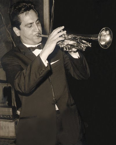 Foto scattata nel 1965 durante una kermesse musicale.